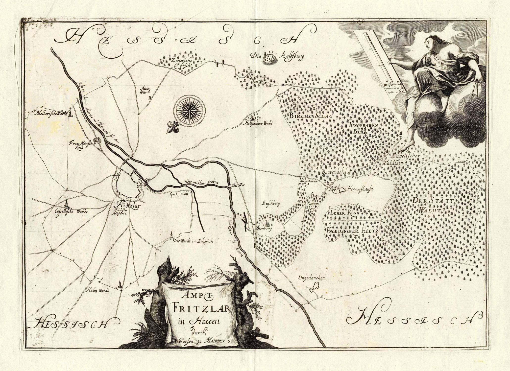 Ampt Fritzlar in Hessen: Eine Karte (Kupferstich) aus dem Atlas Novae Archiepiscopatus Moguntini Tabulae von Nikolaus Person aus dem Jahre 1694. Das Blatt ist nach Südosten ausgerichtet und zeigt das befestigte Fritzlar in Hessen mit den umliegenden Gebieten.